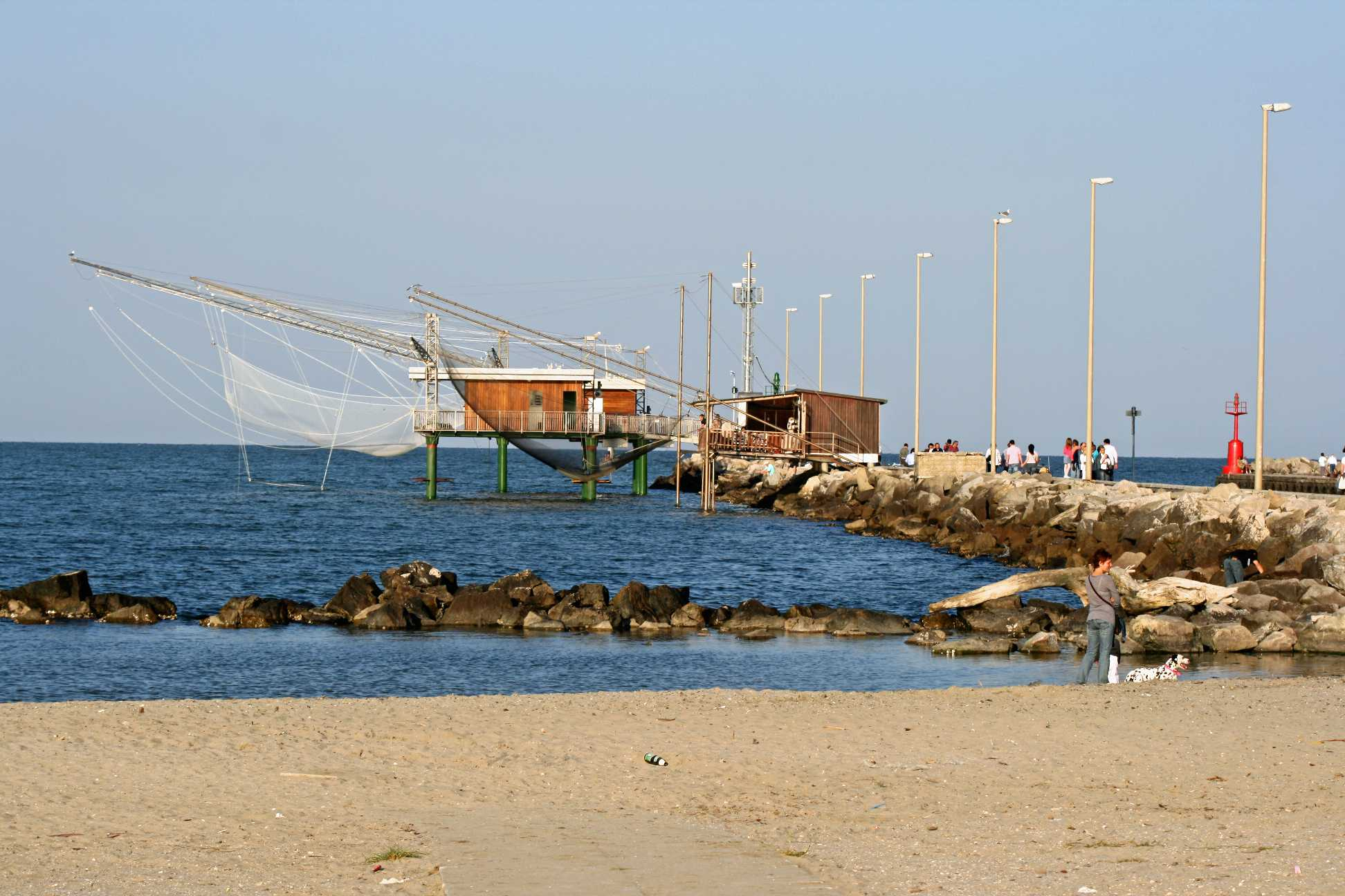 padelloni sul molo